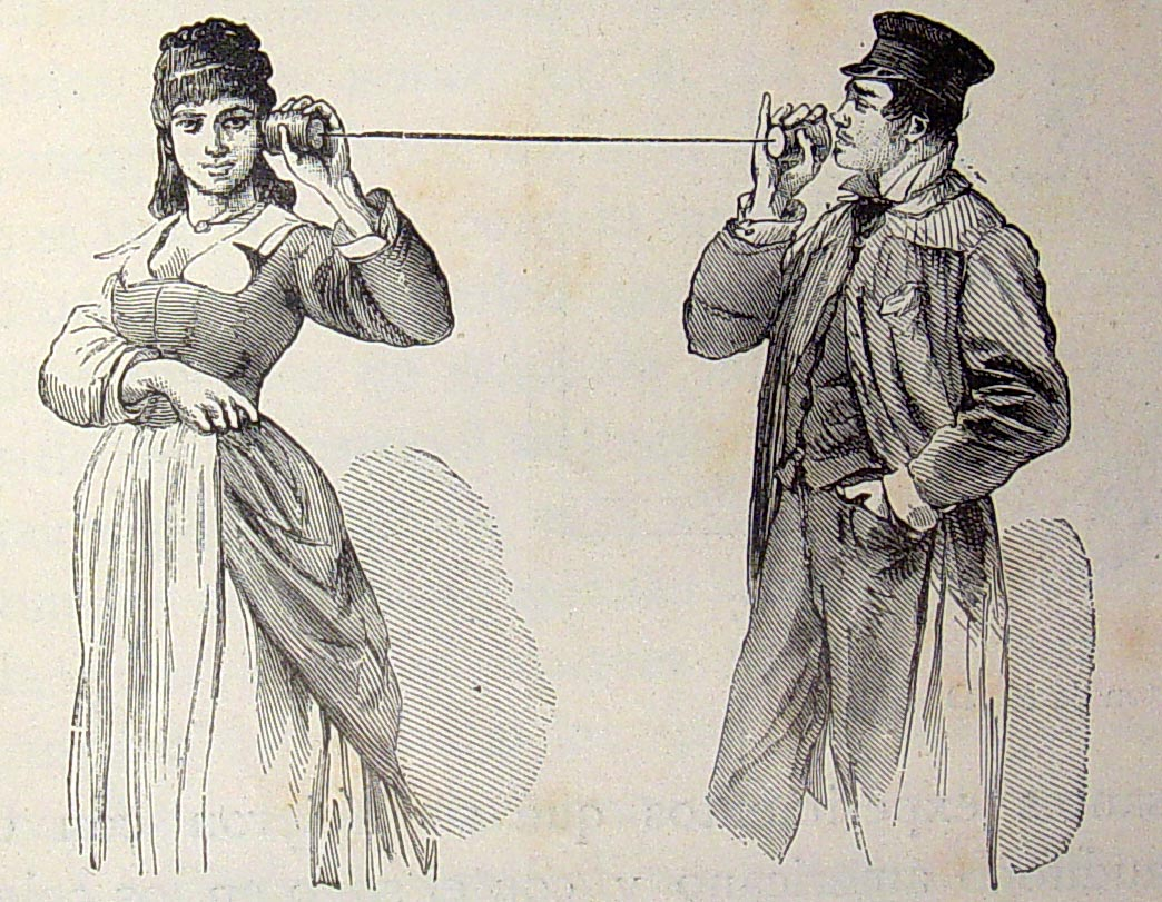 "Teléfono de cordel". Ilustraciones pertenecientes al libro : El mundo físico : gravedad, gravitación, luz, calor, electricidad, magnetismo, etc. / A. Guillemin. - Barcelona Montaner y Simón, 1882